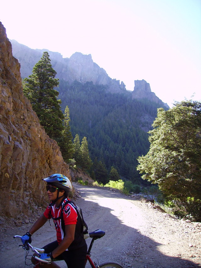 Cuyin Manzano, Los Lagos, Neuquén, Argentina